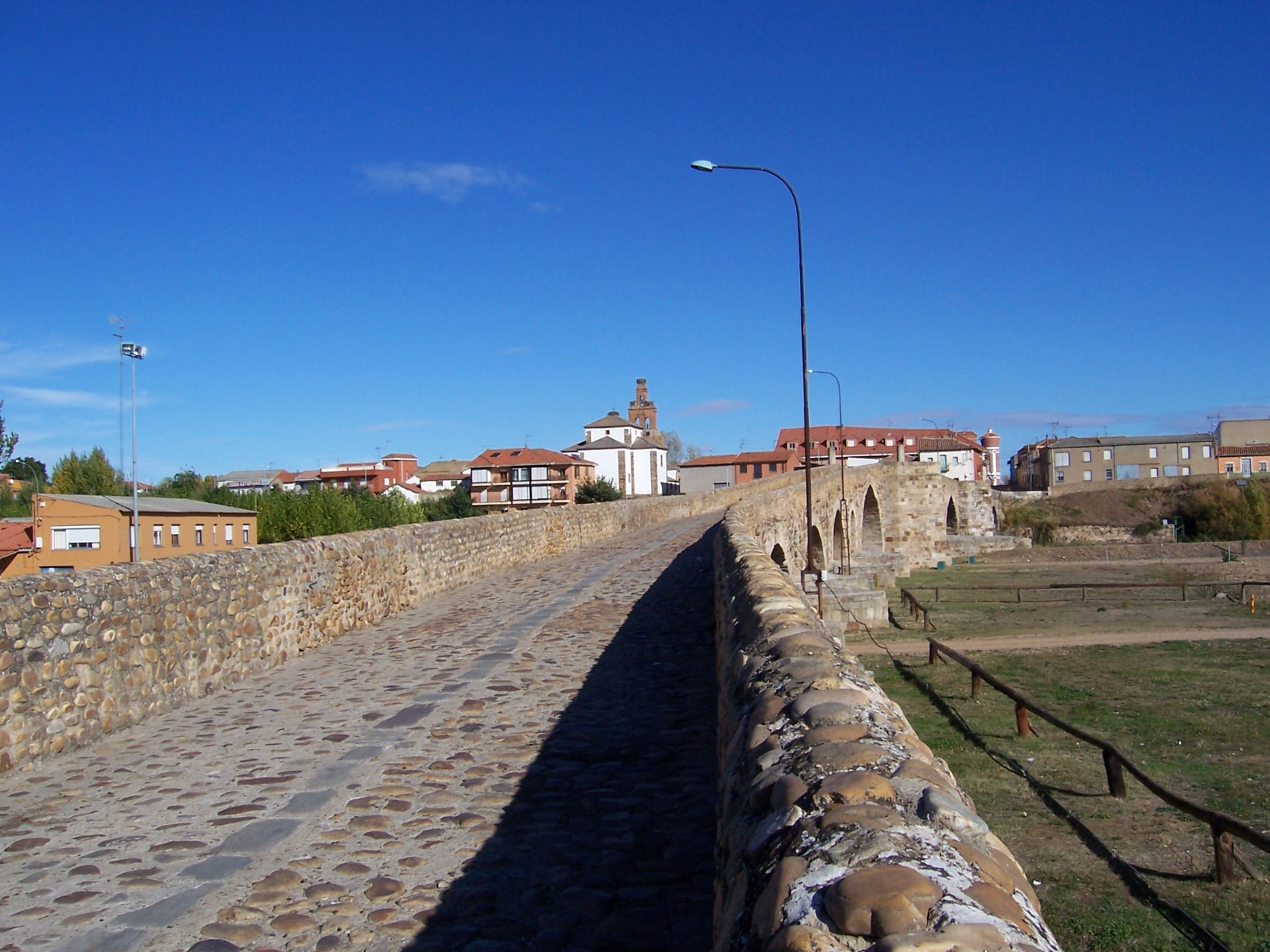 Puente Honroso en Hospital de Órbigo (León, España). Por aquí pasaban los peregrinos del Camino de Santiago. Autor de la fotografía: Lourdes Cardenal, 2005.